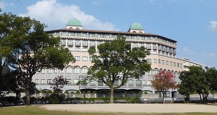 カトリック長崎大司教館